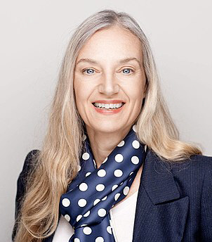 Prof. Christiane Riedel, geschäftsführender Vorstand des ZKM Karlsruhe, Deutschland